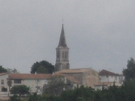 Eglise Notre-Dame de l'Assomption de Soubran